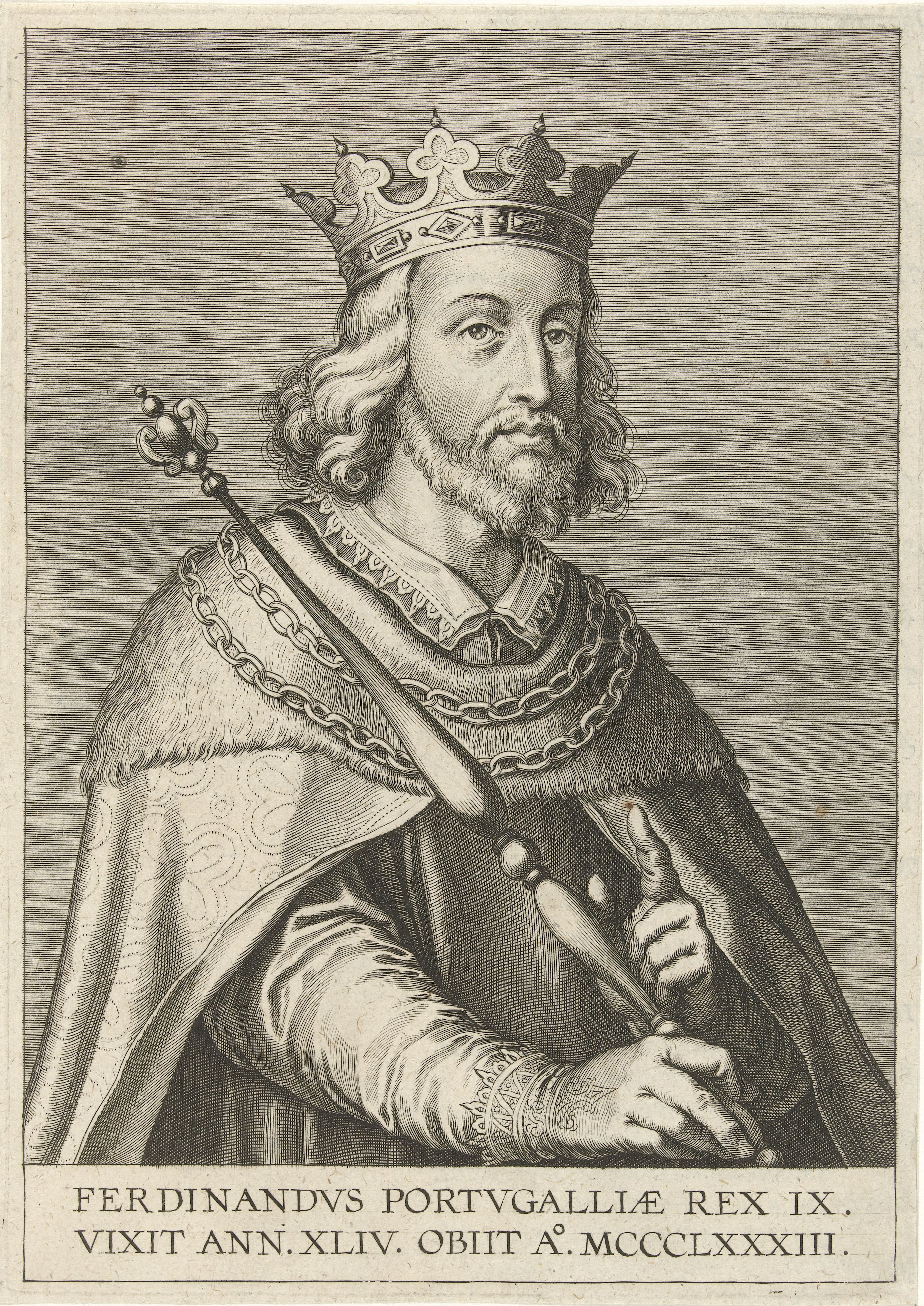 IdentificatieTitel(s): Portret van koning Ferdinand I van PortugalKoningen en prinsen van Portugal (serietitel)Objecttype: prent boekillustratie Objectnummer: RP-P-1905-1487Catalogusreferentie: Hollstein Dutch 193-218Opmerking: abusievelijk beschreven als Cornelis II; 1(2), 2 staten in de collectie van het RijksmuseumOpschriften / Merken: verzamelaarsmerk, verso, gestempeld: Lugt 2228VervaardigingVervaardiger: prentmaker: Cornelis Galle (I)prentmaker: Cornelis Galle (II) (verworpen toeschrijving)Plaats vervaardiging: prentmaker: Zuidelijke Nederlandenprentmaker: AntwerpenDatering: 1621Fysieke kenmerken: gravureMateriaal: papier Techniek: graveren (drukprocedé)Afmetingen: plaatrand: h 190 mm × b 132 mmToelichtingIllustratie voor: Antonio Vasconcellos. Anacephalæoses id est, Svmma captia actorvm regvm Lvsitaniæ. Antwerpen: Petrus II en Joannes II Bellerus, 1621.OnderwerpWat: insignia and symbols of sovereignty (crown, diadem, sceptre, orb, seal, standard, cloak, pectoral)Waar: PortugalWie: Ferdinand I (koning van Portugal)Verwerving en rechtenVerwerving: aankoop 1905Copyright: Publiek domein